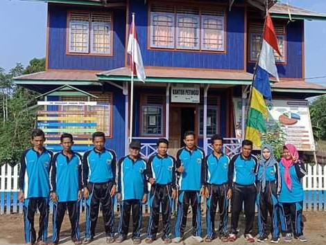 kantor desa muyub ulu beserta perangkat atau pengurus desa, foto ini diambil pada saat pelaksanaan jumat bersih